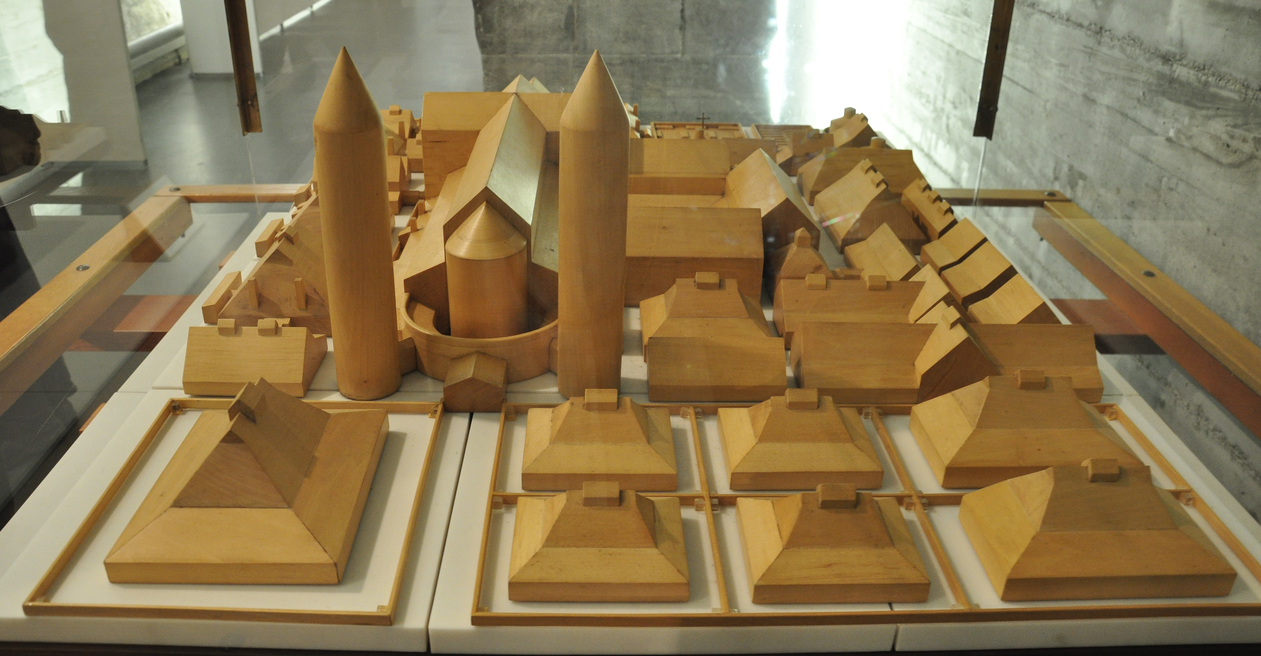 St. Gallen, Lapidarium, Holzmodell nach dem St. Galler Klosterplan